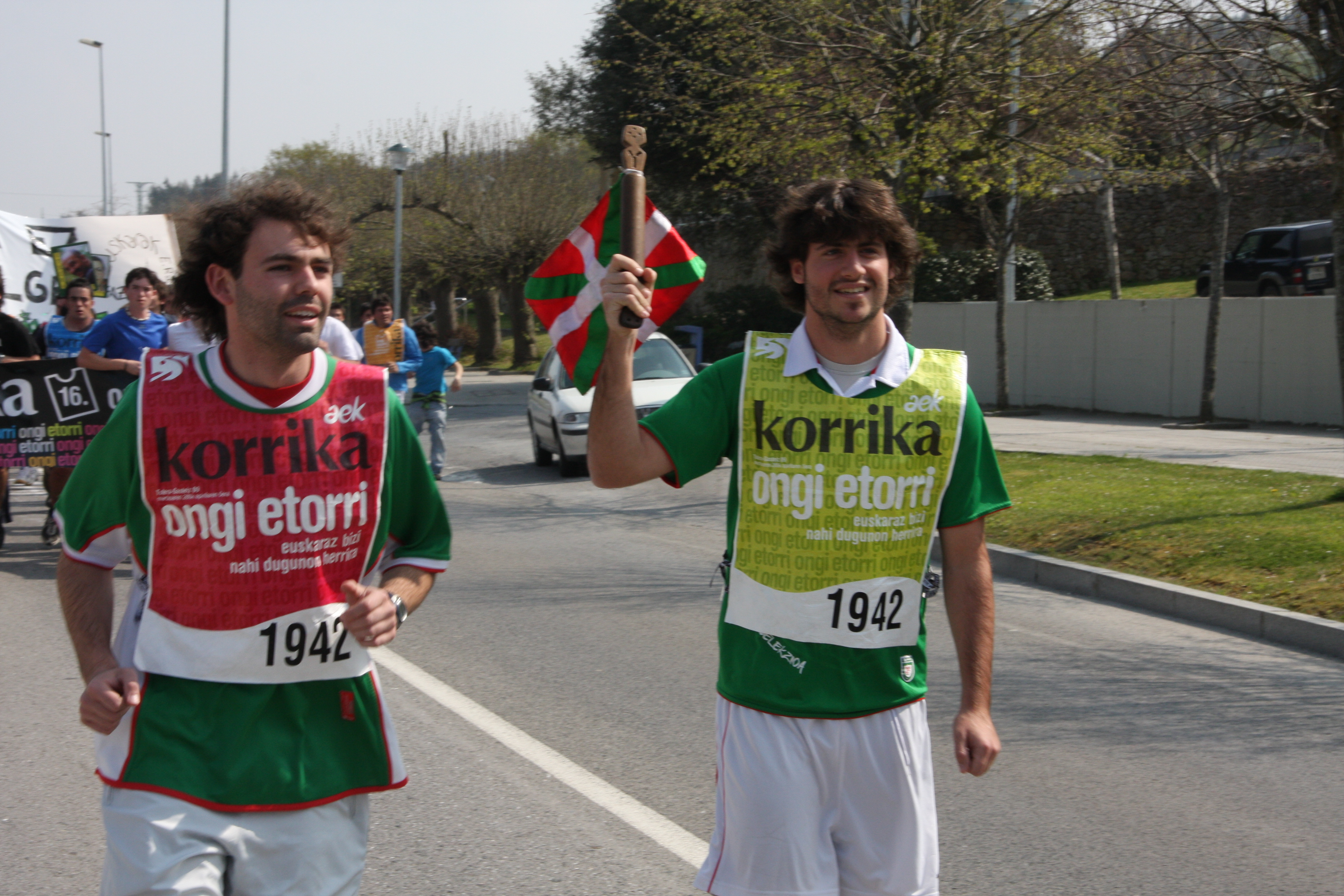 Km 1942 (de Urdúliz a Sopelana) de la 16 edicion de la Korrika (3 de abril de 2009). El testigo de la Korrika que porta el corredor es una copia realizada por Juan Gorriti de un original diseñado por el escultor Remigio Mendiburu.